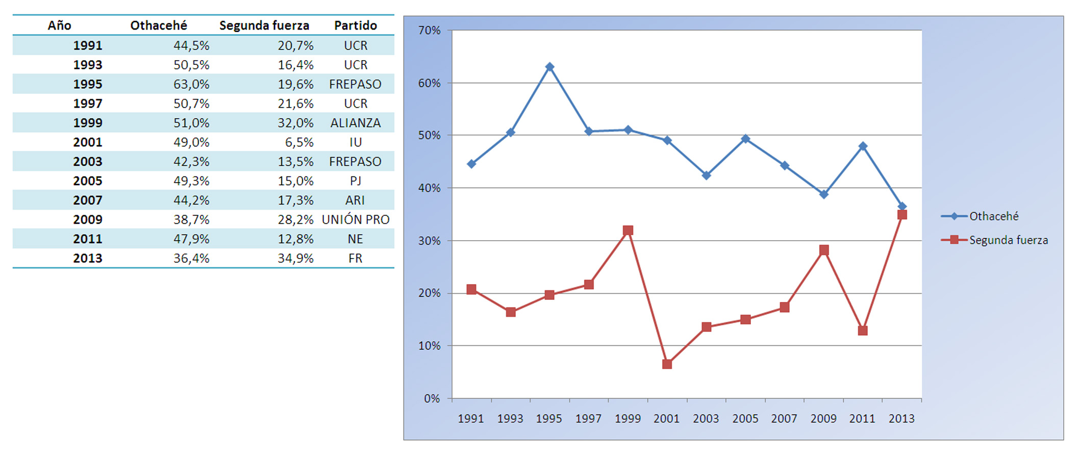 Evolución de las elecciones en el Partido de Merlo, Argentina desde 1991 hasta 2013. Hecho con excel, los datos los extraje de